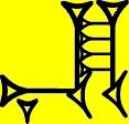 en, cuneiforme, sumerico: "sacerdote"; accadico: entu; enu. Anche nel significato di "signore". Unicode colorato di giallo